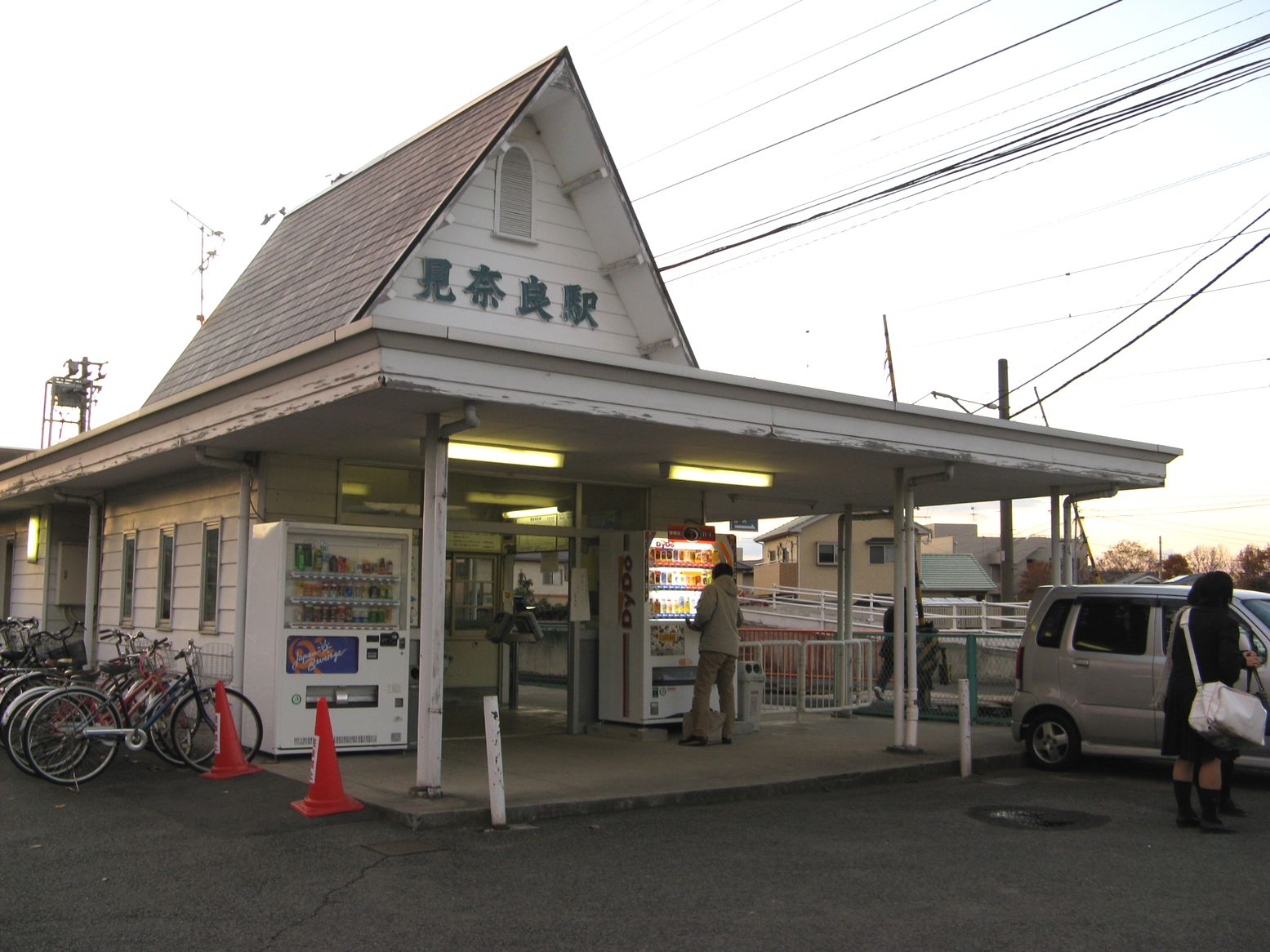 伊予鉄道横河原線見奈良駅 駅舎